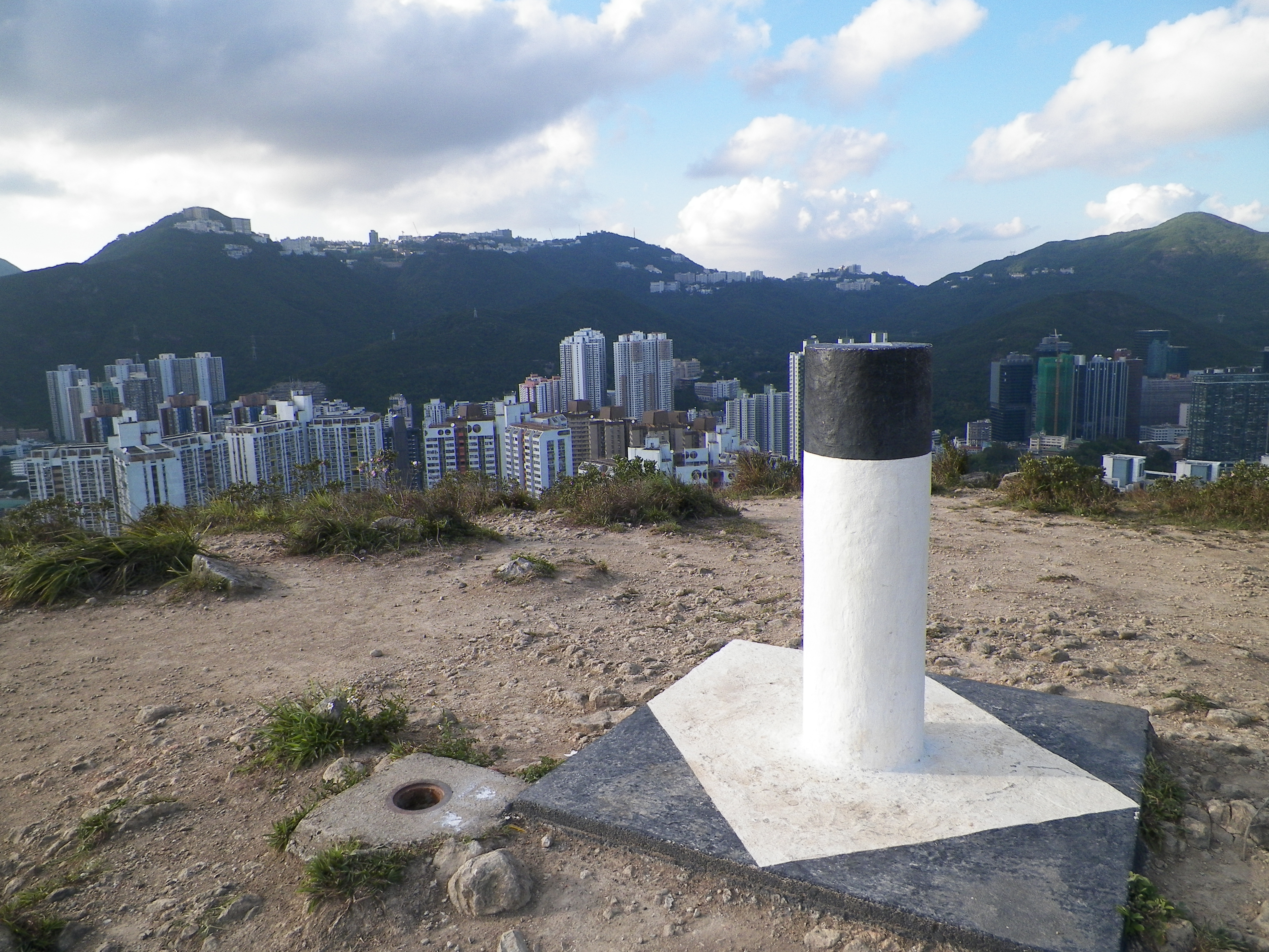 中文（香港）: 玉桂山